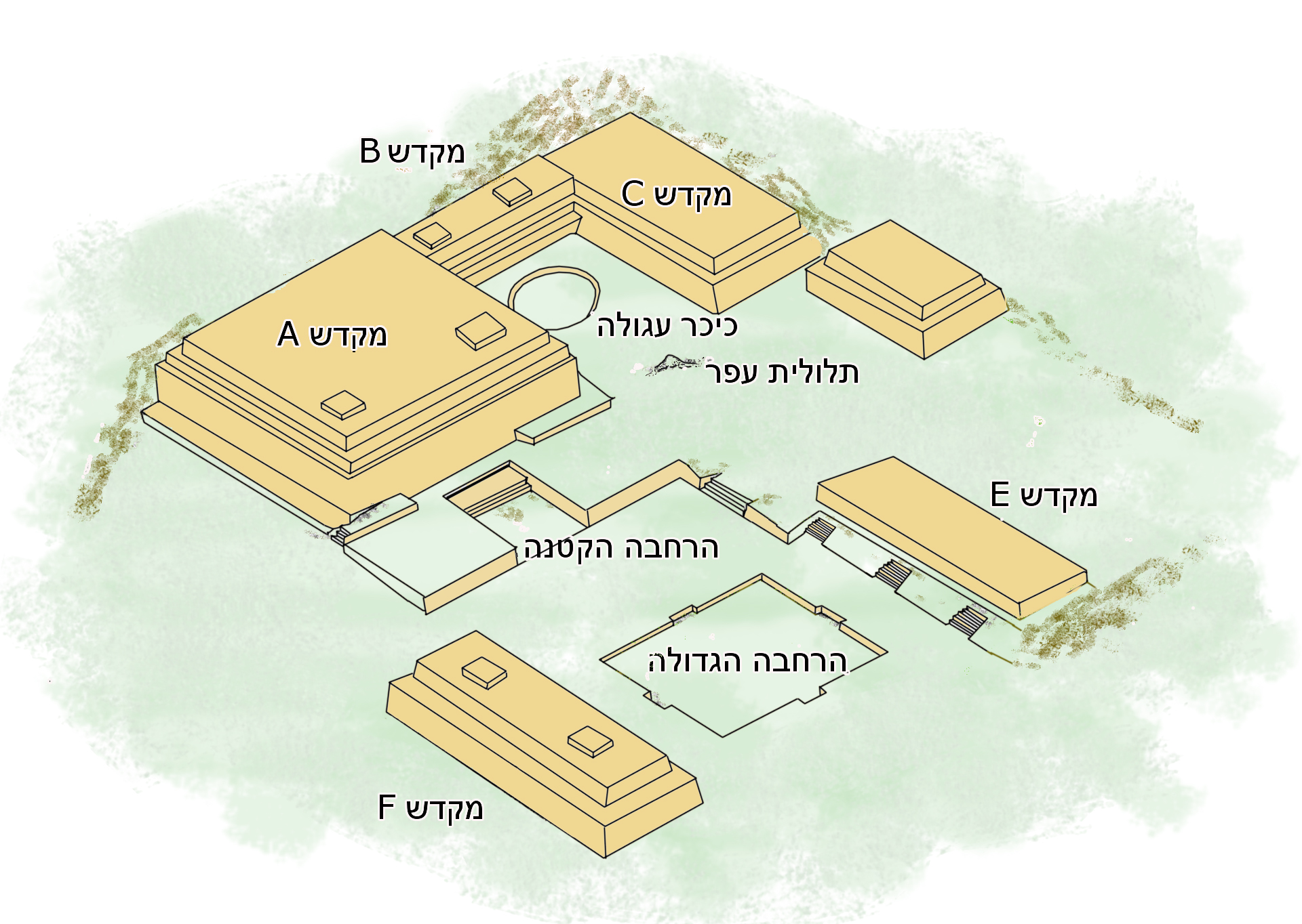 תרשים צ'אווין דה ואנטאר